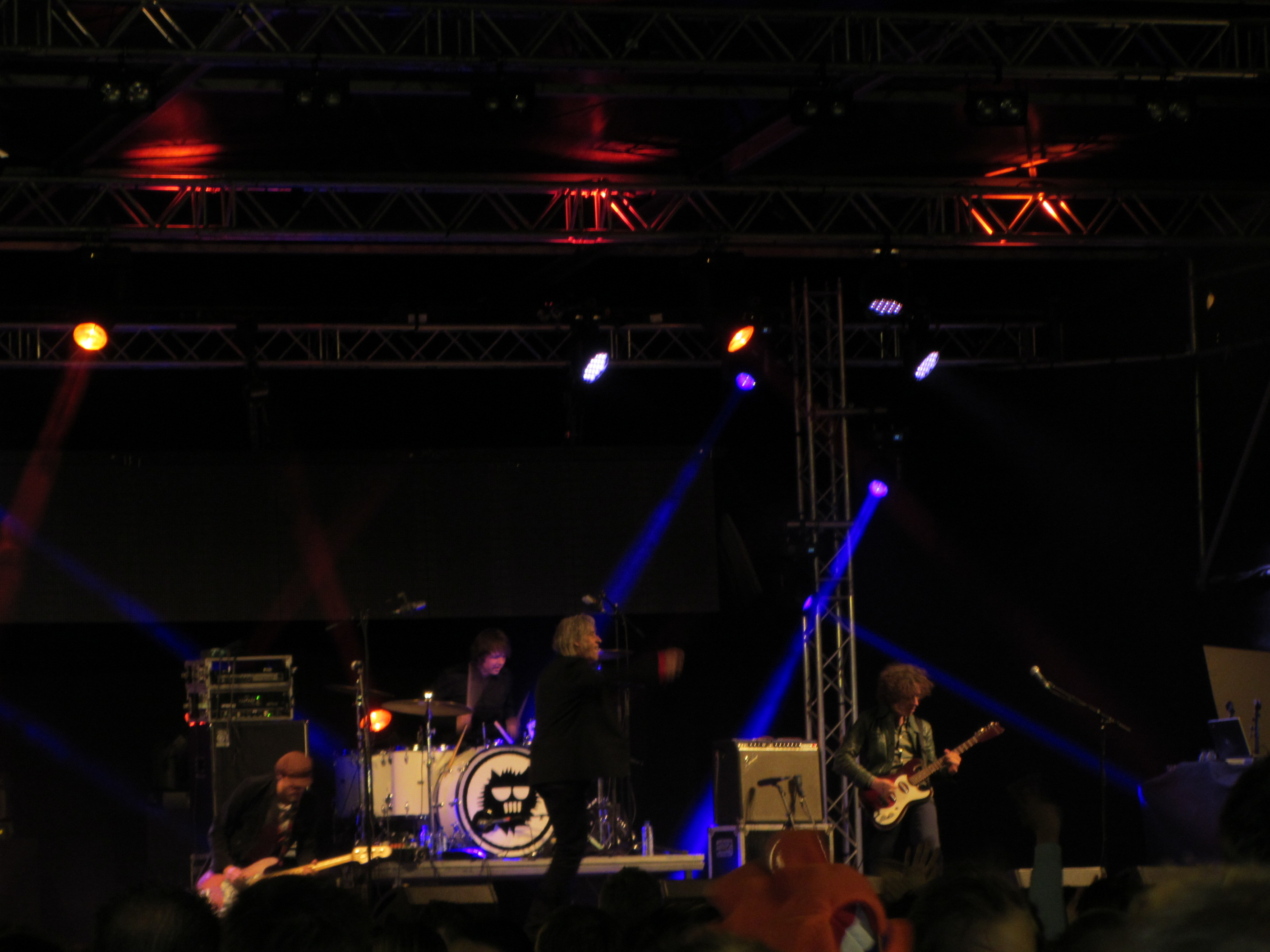 Claw Boys Claw - Den Haag 2013